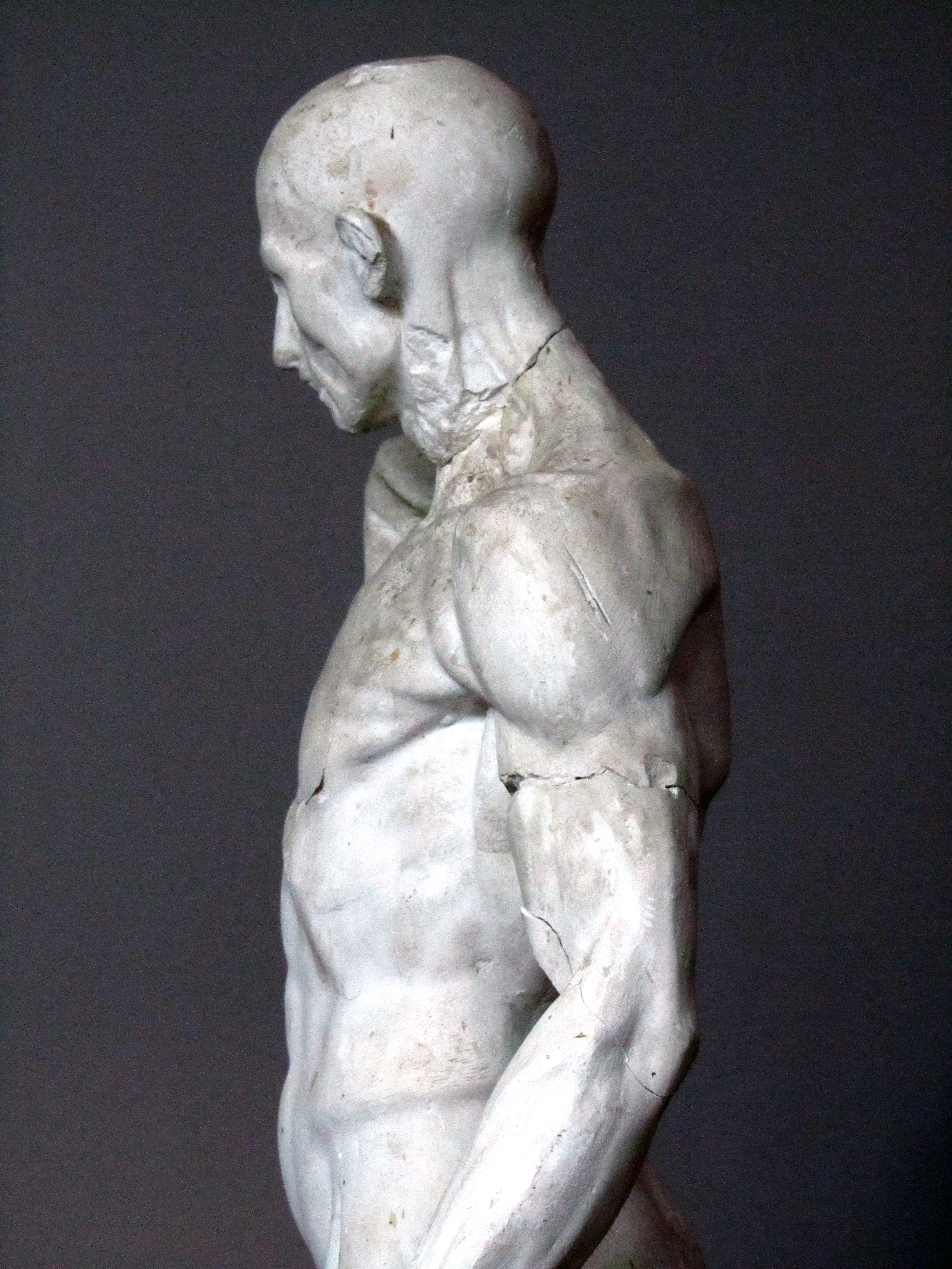 Copia en yeso de la escultura L'Ecorché de Jean Antoine Houdon